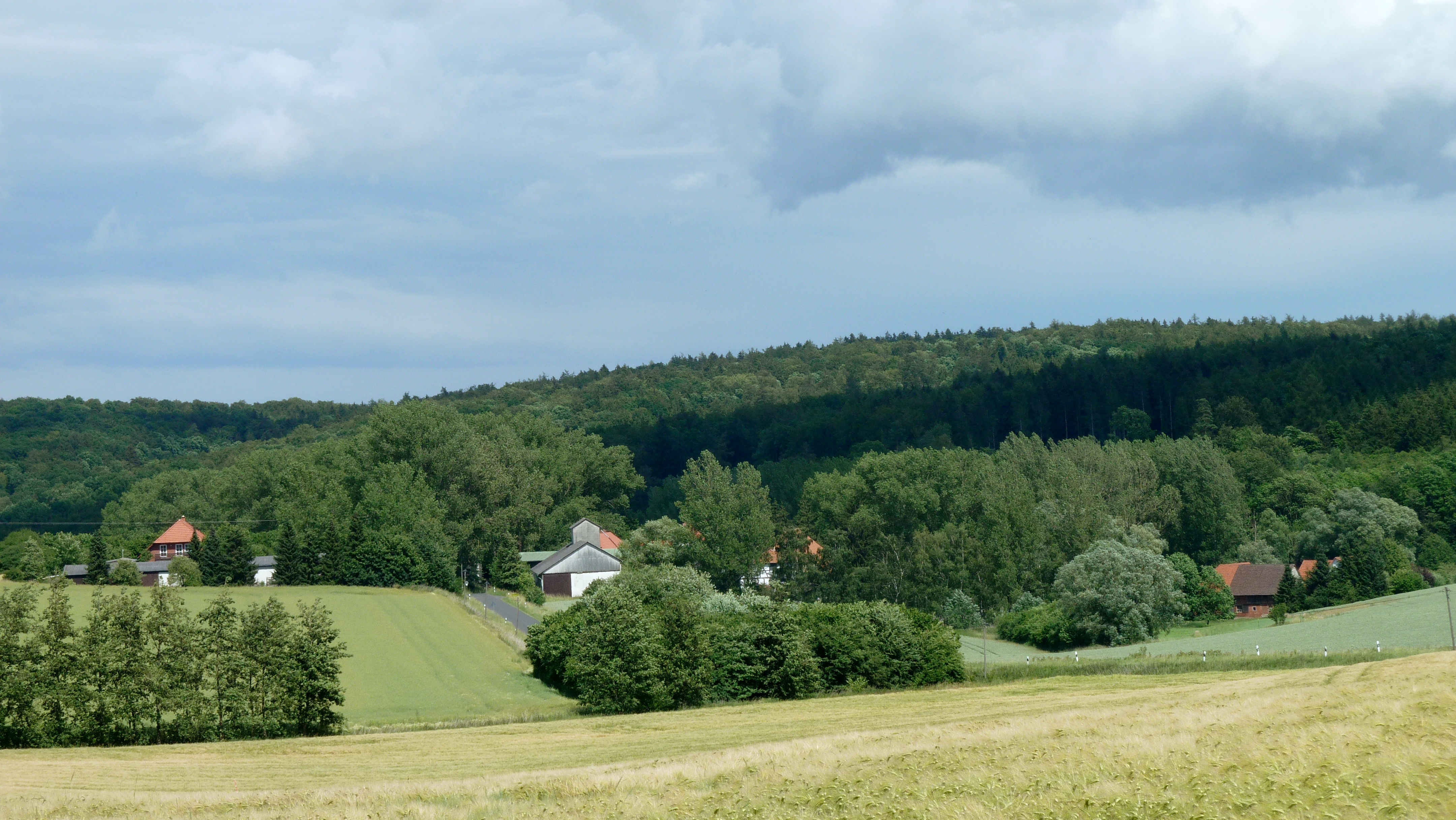 Blick vom Einenberg nach Osten über Himmigerode auf den Desingeröder Wald (Silberberg, Fuchsberg)